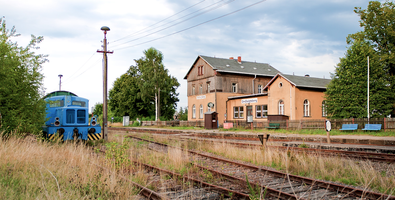 Museumsbahnhof Großvoigtsberg, Sachsen